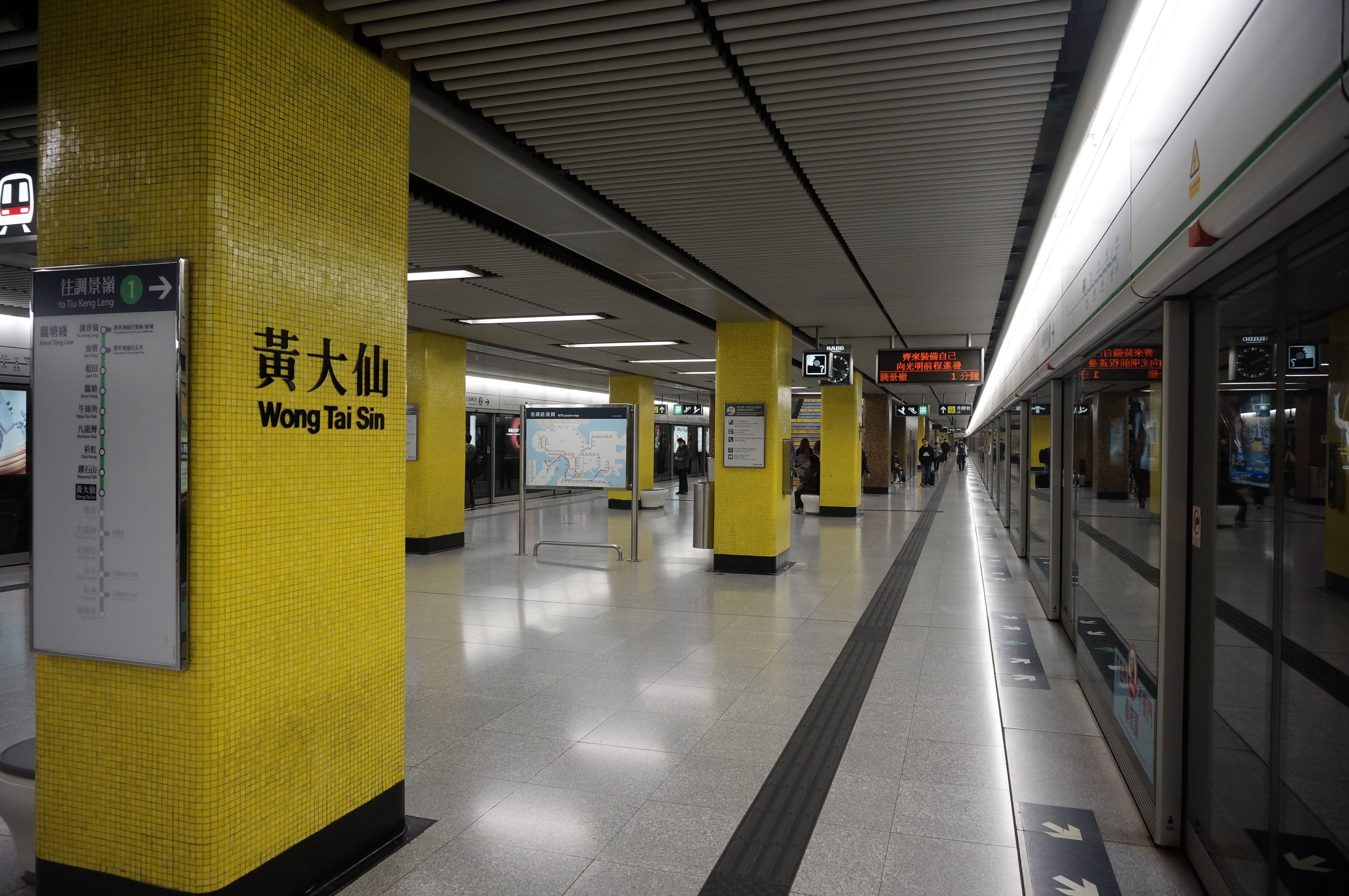 港鐵黃大仙站月台